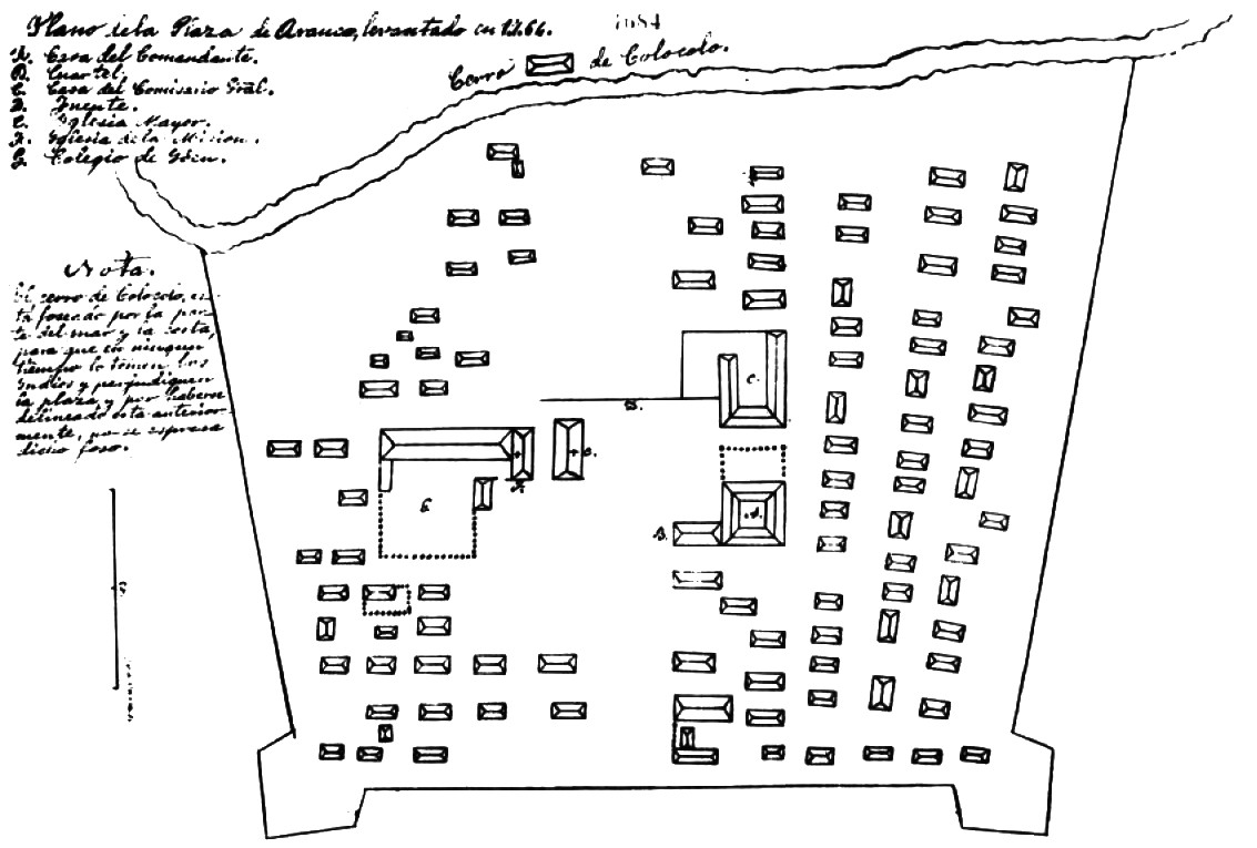 Plano de la plaza fuerte de Arauco, Chile